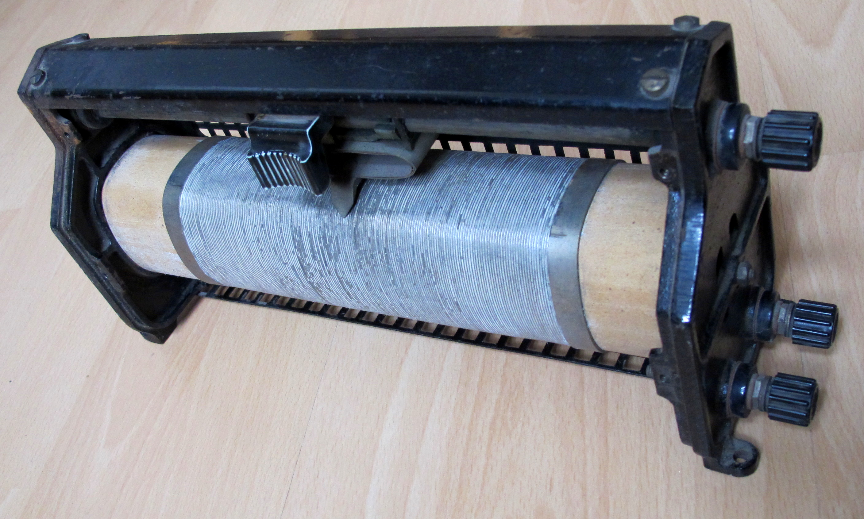 Leistungspotentiometer in Schieberausführung mit 40 Ω und 100 Watt